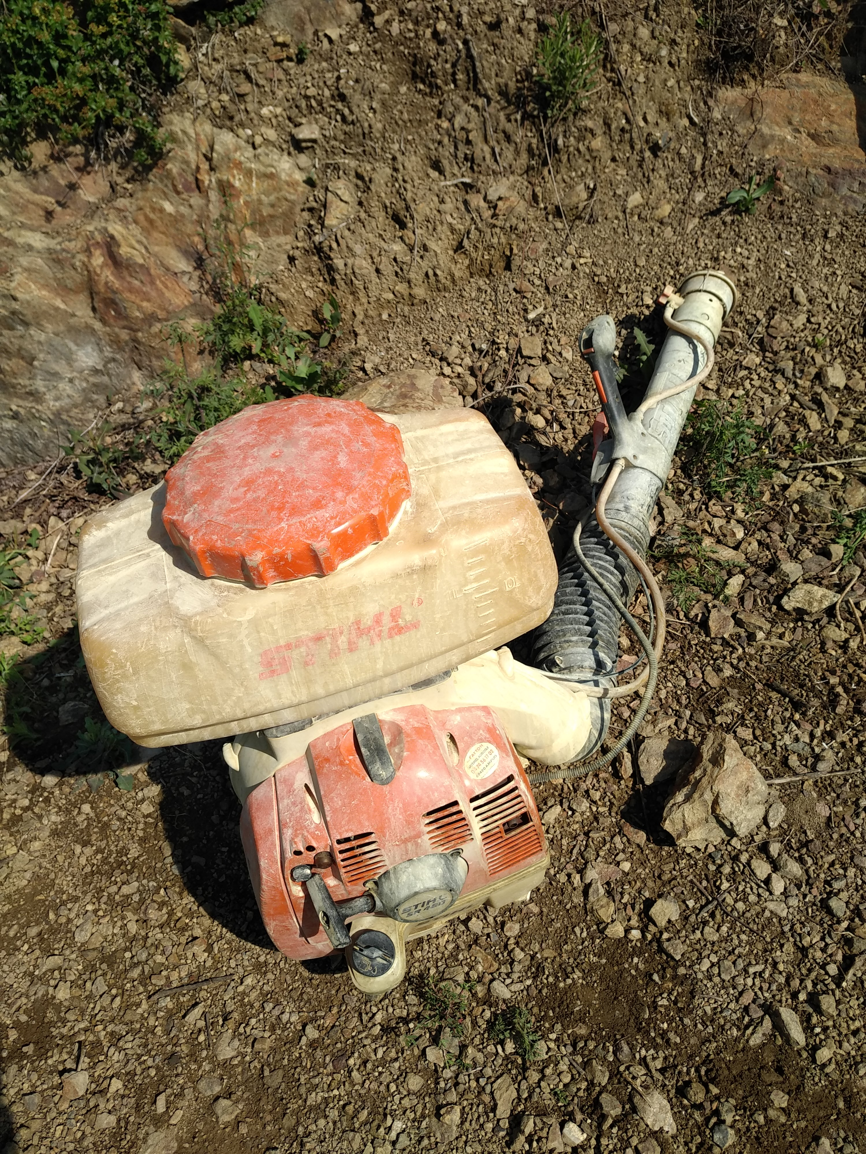 Atomiseur pour produit phytosanitaires utilisé en viticulture dans les parcelles difficiles d'accès, de marque Stihl.